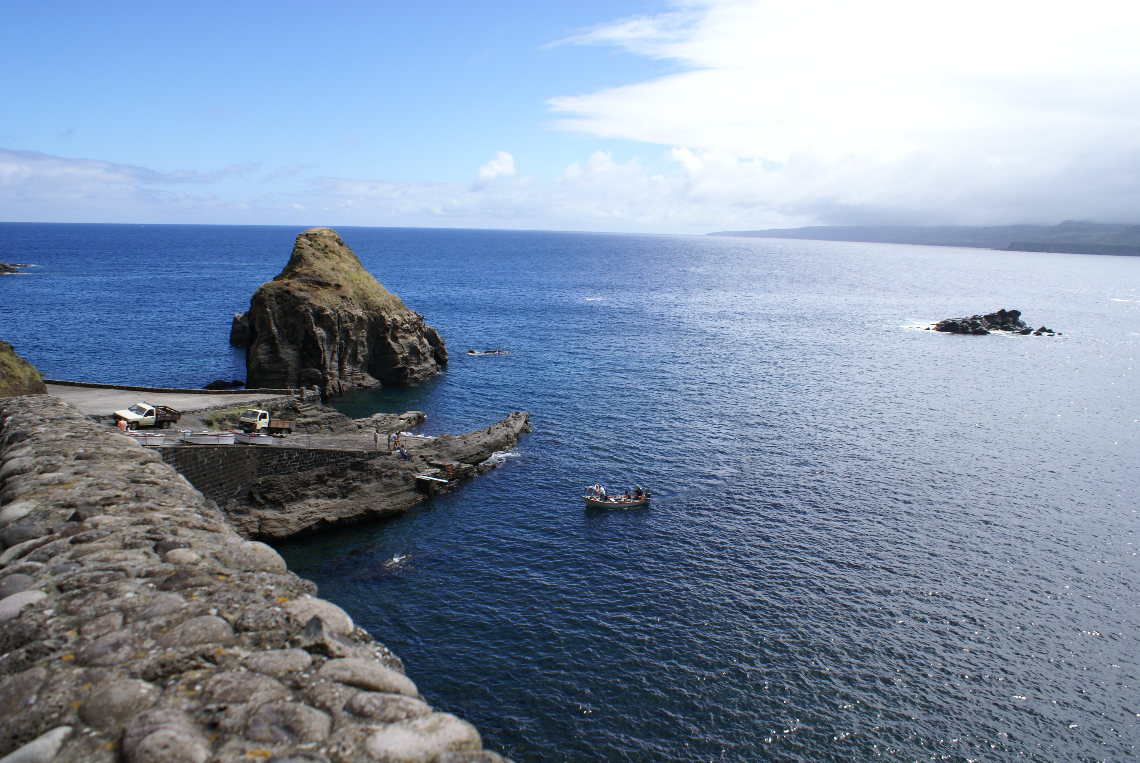 Vista parcial do Porto de Santa Iria, Ribeirinha, Ribeira Grande, ilha de São Miguel, Açores